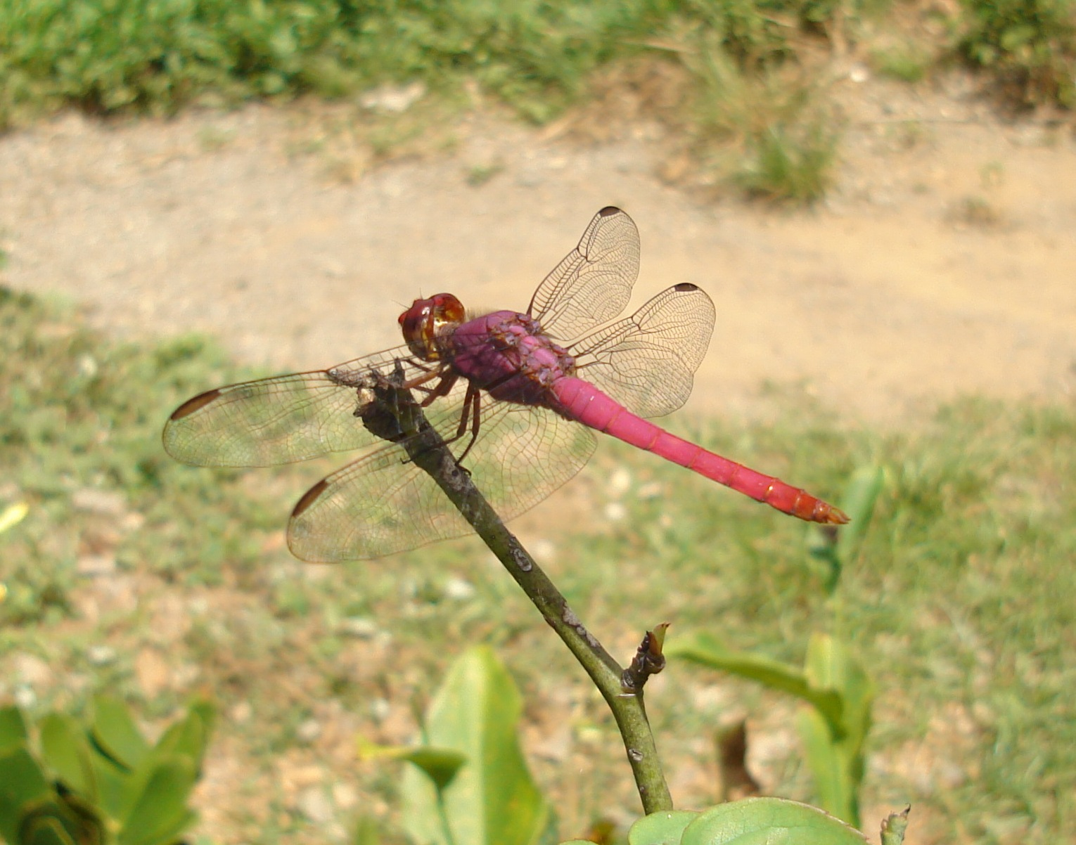 Odonata desconocido, fotografiado en las cercanías del Parque Nacional Viñales, Pinar del Río, Cuba.